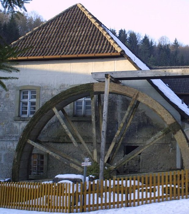 Heroldsmühle bei Heiligenstadt in Oberfranken